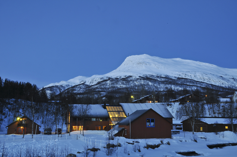 Folkehøgskolen 69 grader Nord, Troms, Norge